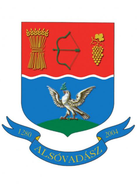 Alsóvadász község címere Magyarország